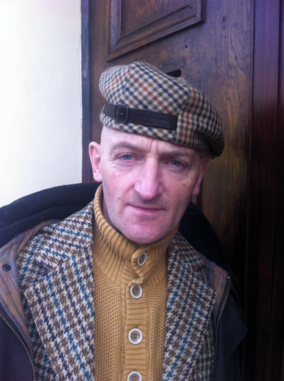 Norbert Leithold im Oktober 2013 in Ludwigslust